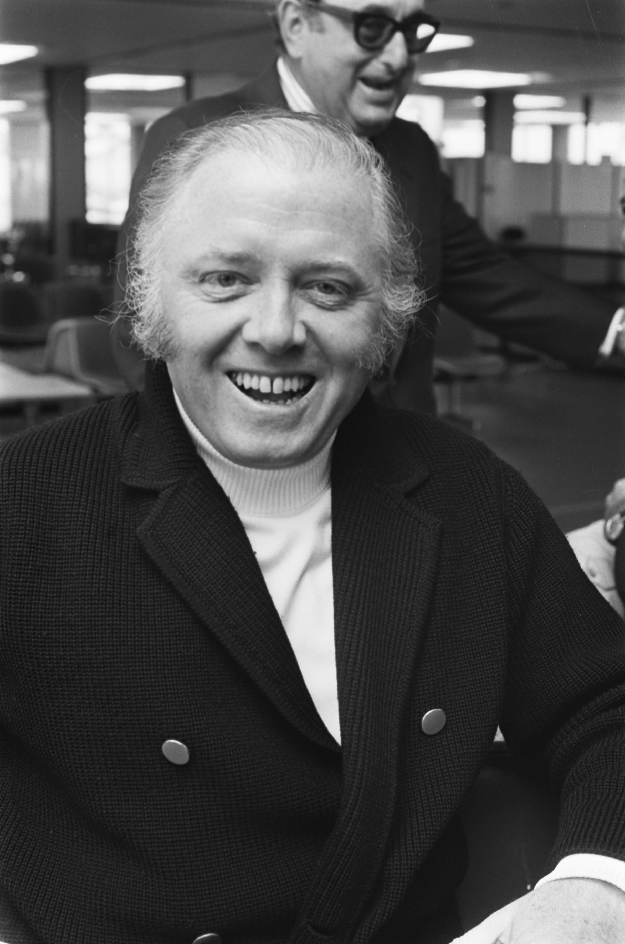 Collectie / Archief : Fotocollectie Anefo Reportage / Serie : De filmmakers van "Een brug te ver" komen aan op Schiphol i.v.m. de filmopnames in Nederland Beschrijving : Regisseur Richard Attenborough Datum : 24 juli 1975 Locatie : Noord-Holland, Schiphol Trefwoorden : portretten, regisseurs Persoonsnaam : Attenborough, Richard Fotograaf : Bert Verhoeff / Anefo Auteursrechthebbende : Nationaal Archief Materiaalsoort : Negatief (zwart/wit) Nummer archiefinventaris : bekijk toegang 2.24.01.05 Bestanddeelnummer : 928-0661